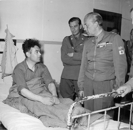 Greve Bernadotte inspekterar RK:s sjukhus i Fauske och samtalar med en patient, ryssen Aleksandr Manilov från Kiev. Manilov, som var finmekaniker i det civila, talade utmärkt tyska. I mitten chefsläkare dr. Ulf Nordwall.